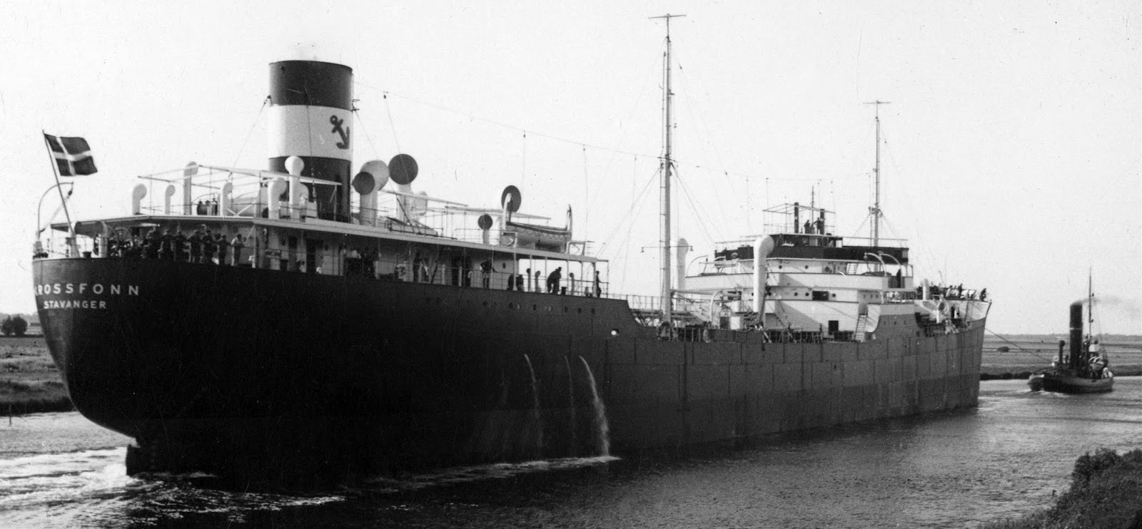 Der norwegische Tanker Krossfonn nach seiner Fertigstellung in Odense, Dänemark; das Schiff wurde 1940 von der Kriegsmarine erbeutet und als Trossschiff Spichern eingesetzt.